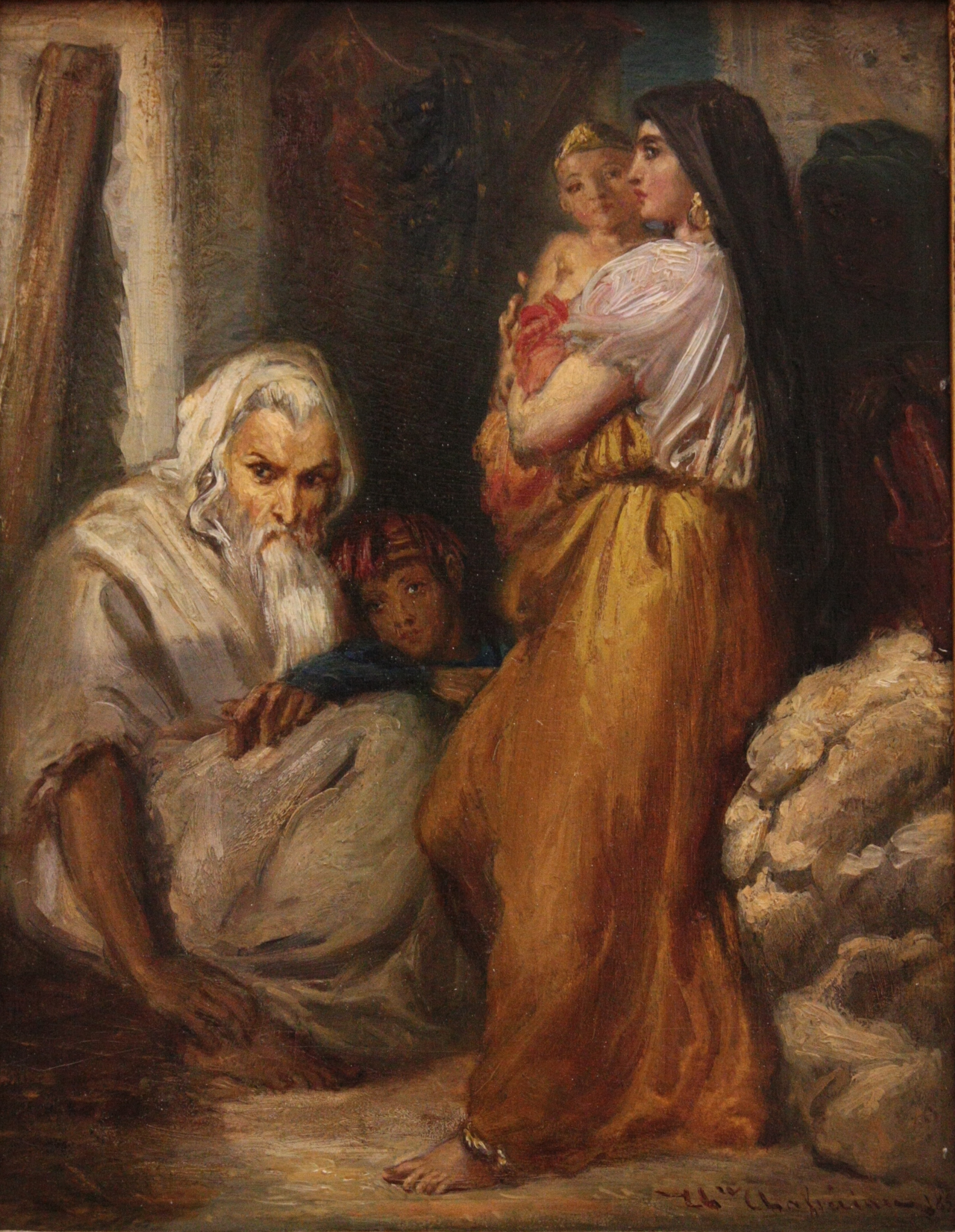 Intérieur juif à Constantine de Théodore Chassériau, 19e siècle